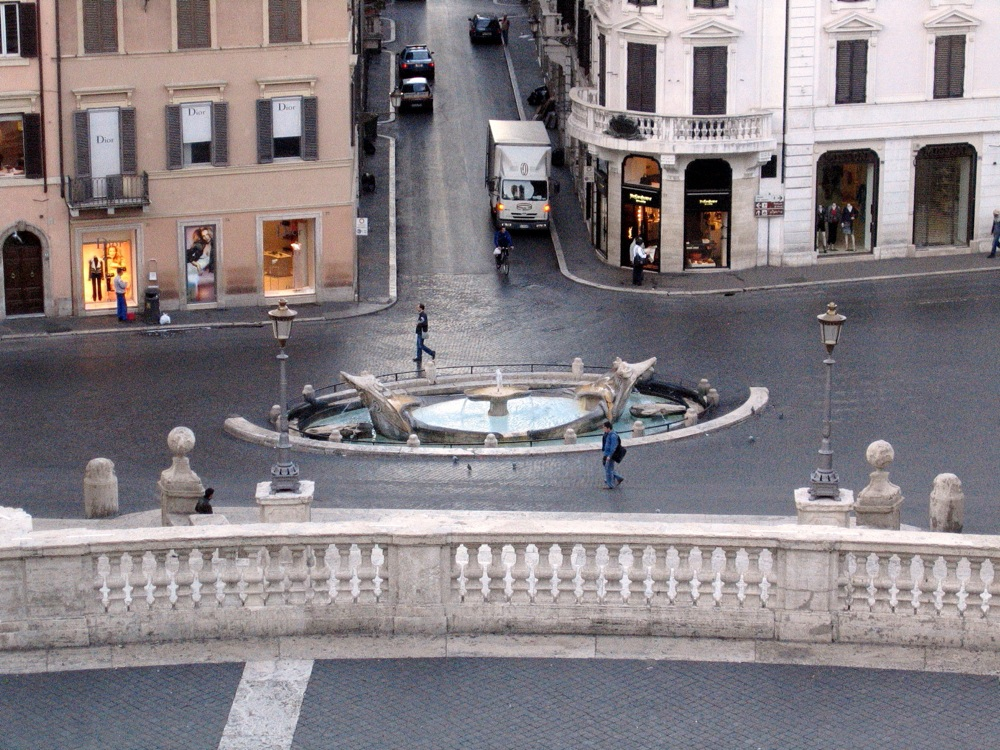 Piazza di Spagna, Roma, Italy